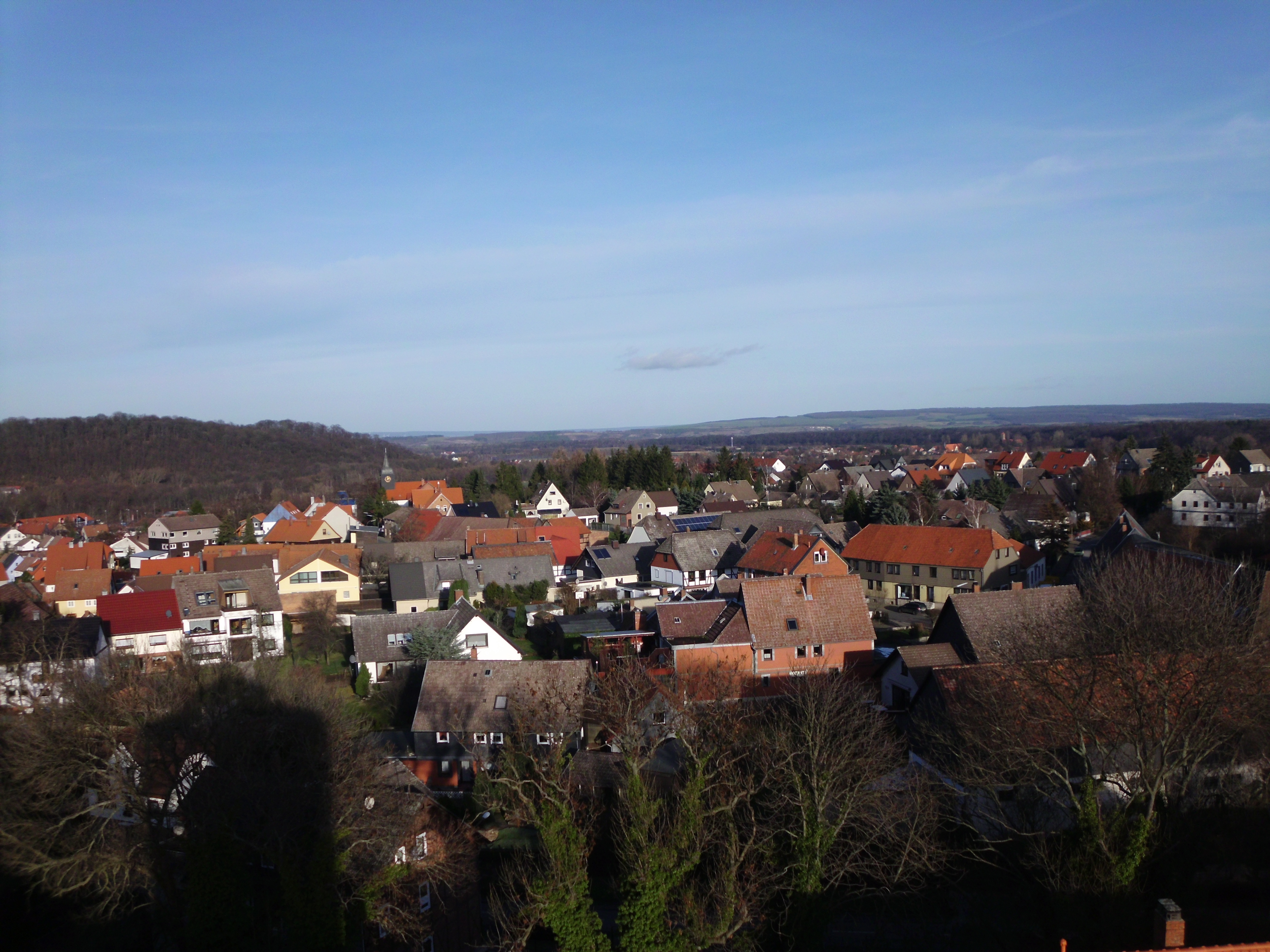 Blick über die Ortsmitte von Vienenburg